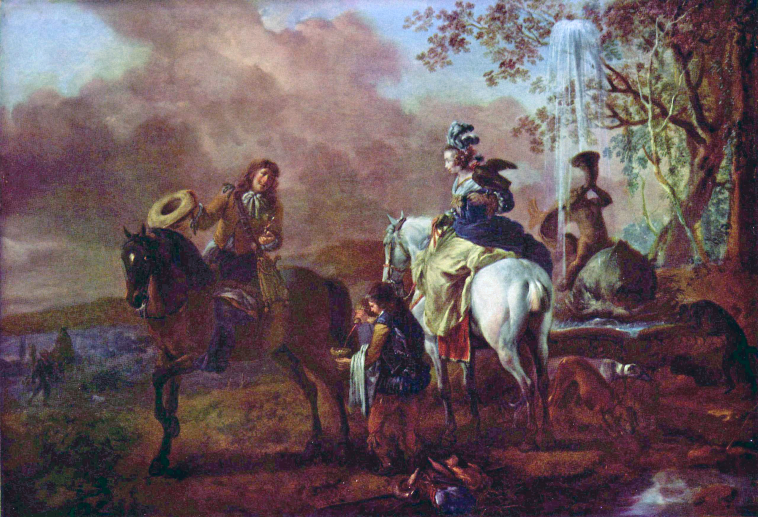 detail